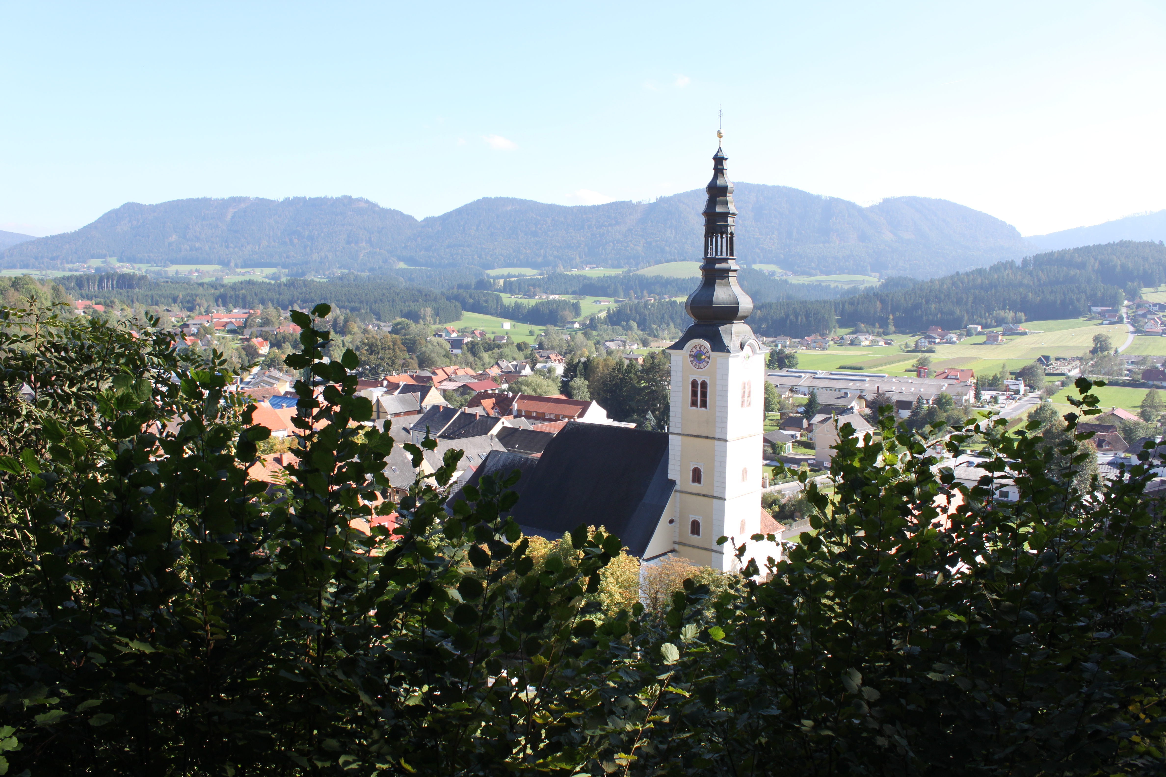 Veitskirche (Passail)